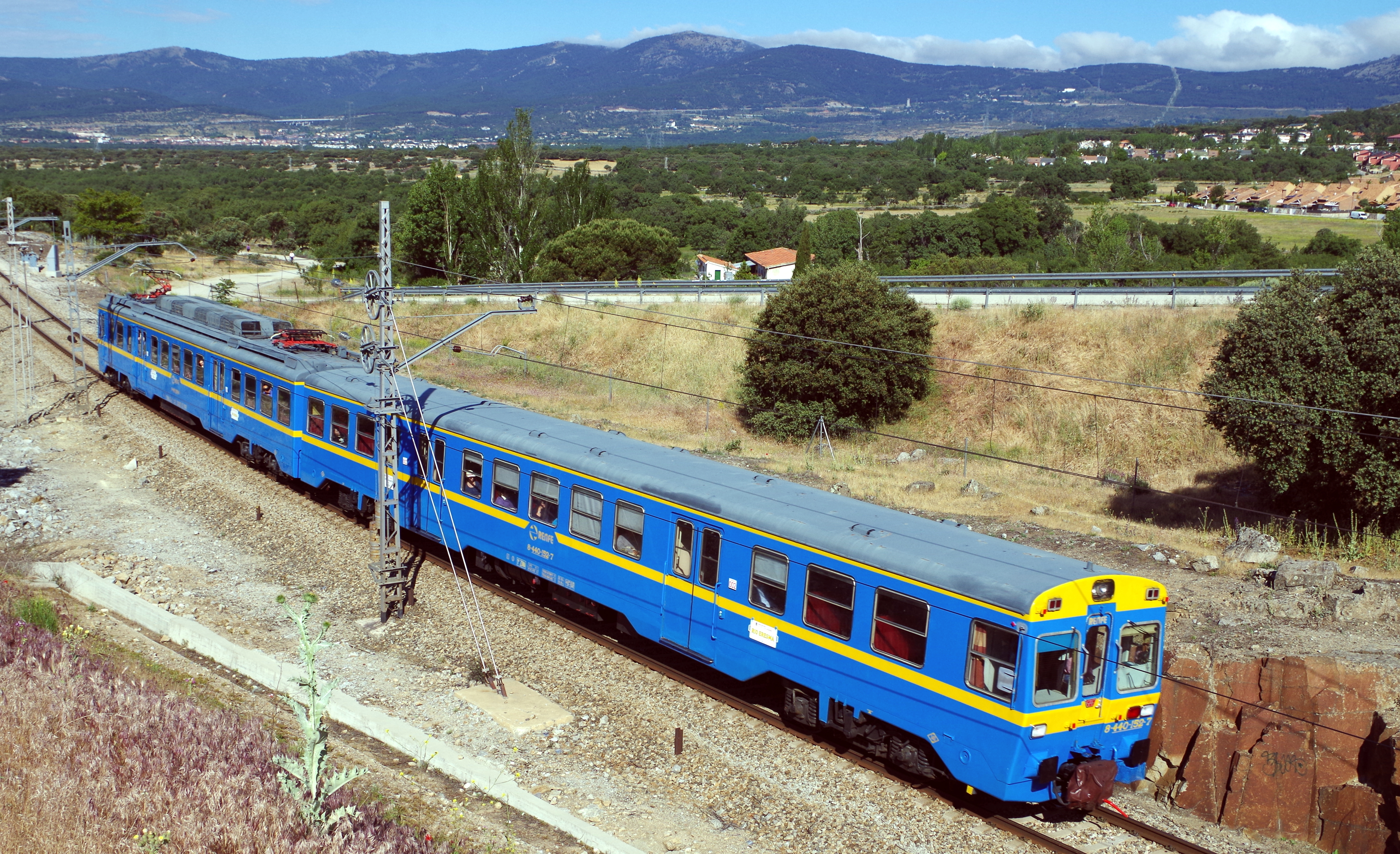 ...que se despide hasta septiembre. Hace menos de un mes decidí salir en busca de algún sitio medianamente accesible en la linea de Segovia para inmortalizar el Tren del Río Eresma. Después de toda la mañana y de un viaje Tetuán - Collado Mediano y una caminata considerable por caminos con más estiércol que tierra. Además esta vez me acompañaba mi nuevo perro, un achorro de bodeguero andaluz del que sin duda veréis alguna foto en el futuro. Un saludo y gracias a todos por pasar por aquí :)